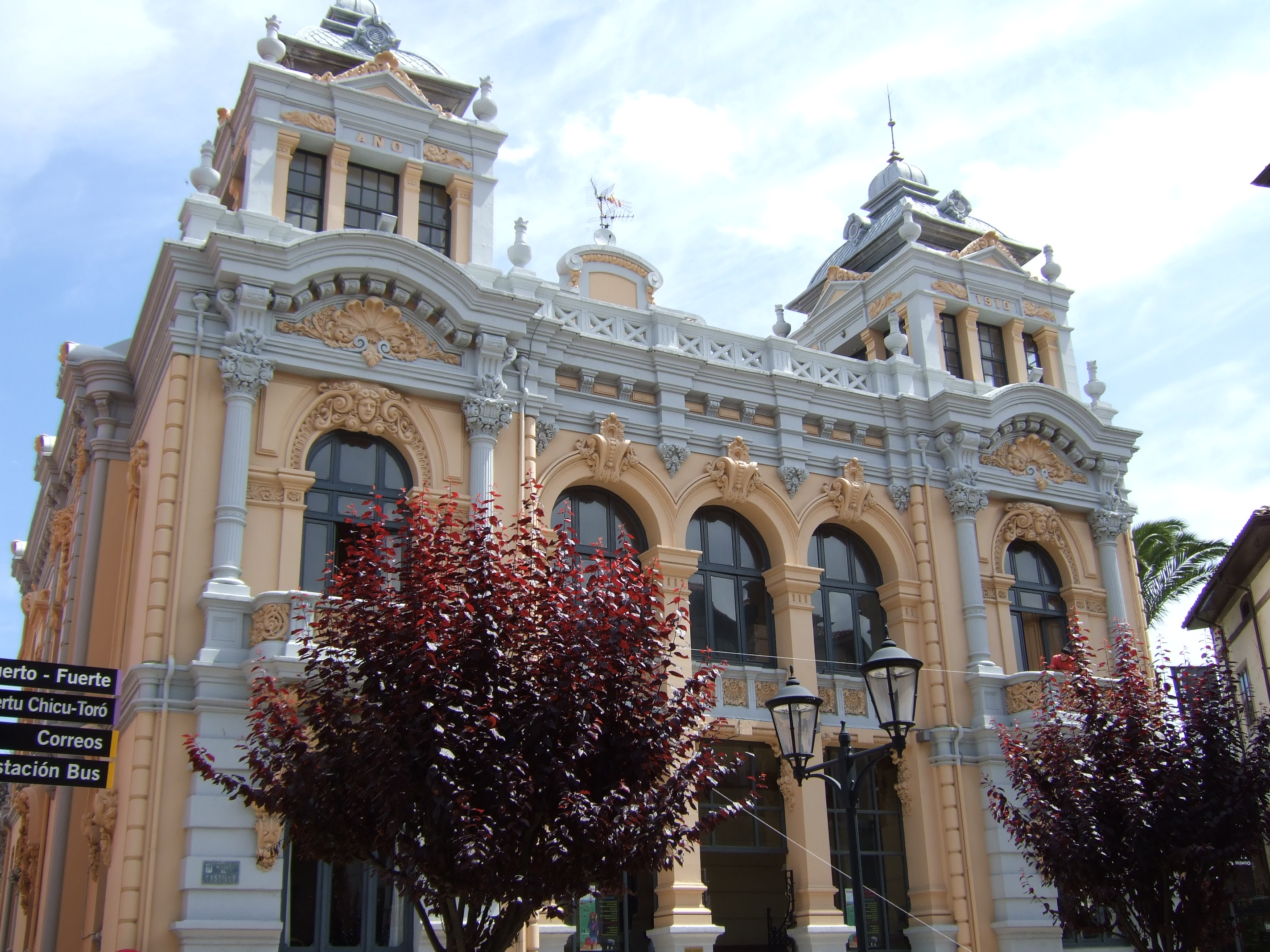 ayuntamiento de Llanes